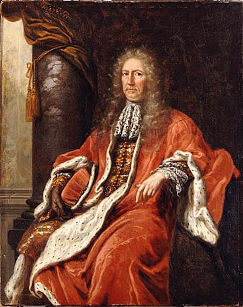 Lars Fleming af Liebelitz, målning av David Klöcker Ehrenstrahl.